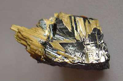 minerał; hematyt i rutyl, pochodzenie Brazylia; autor zdjęcia Piotr Menducki 10.08.2006r.